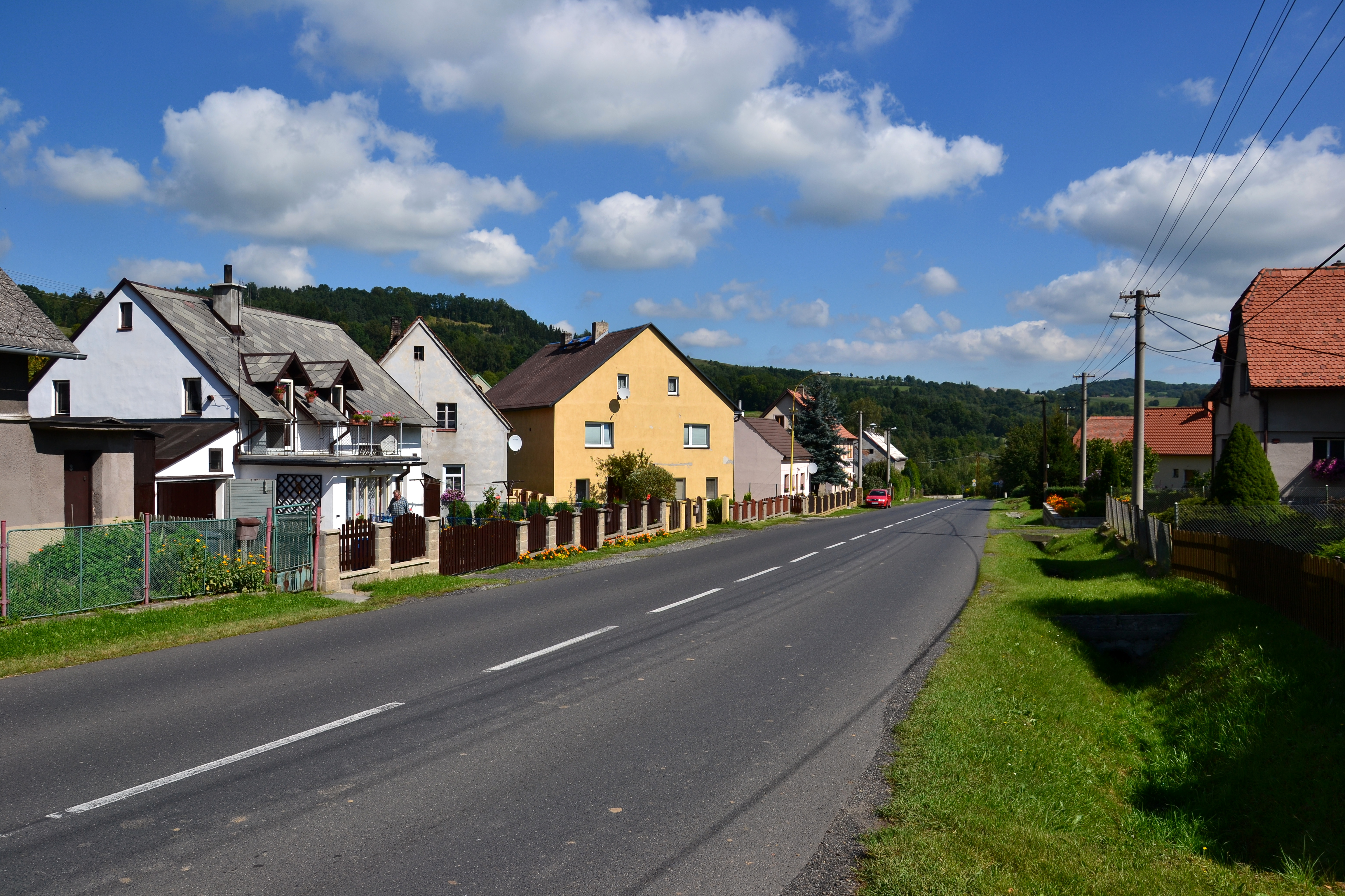 Hlavní ulice směrem k Ploučnici